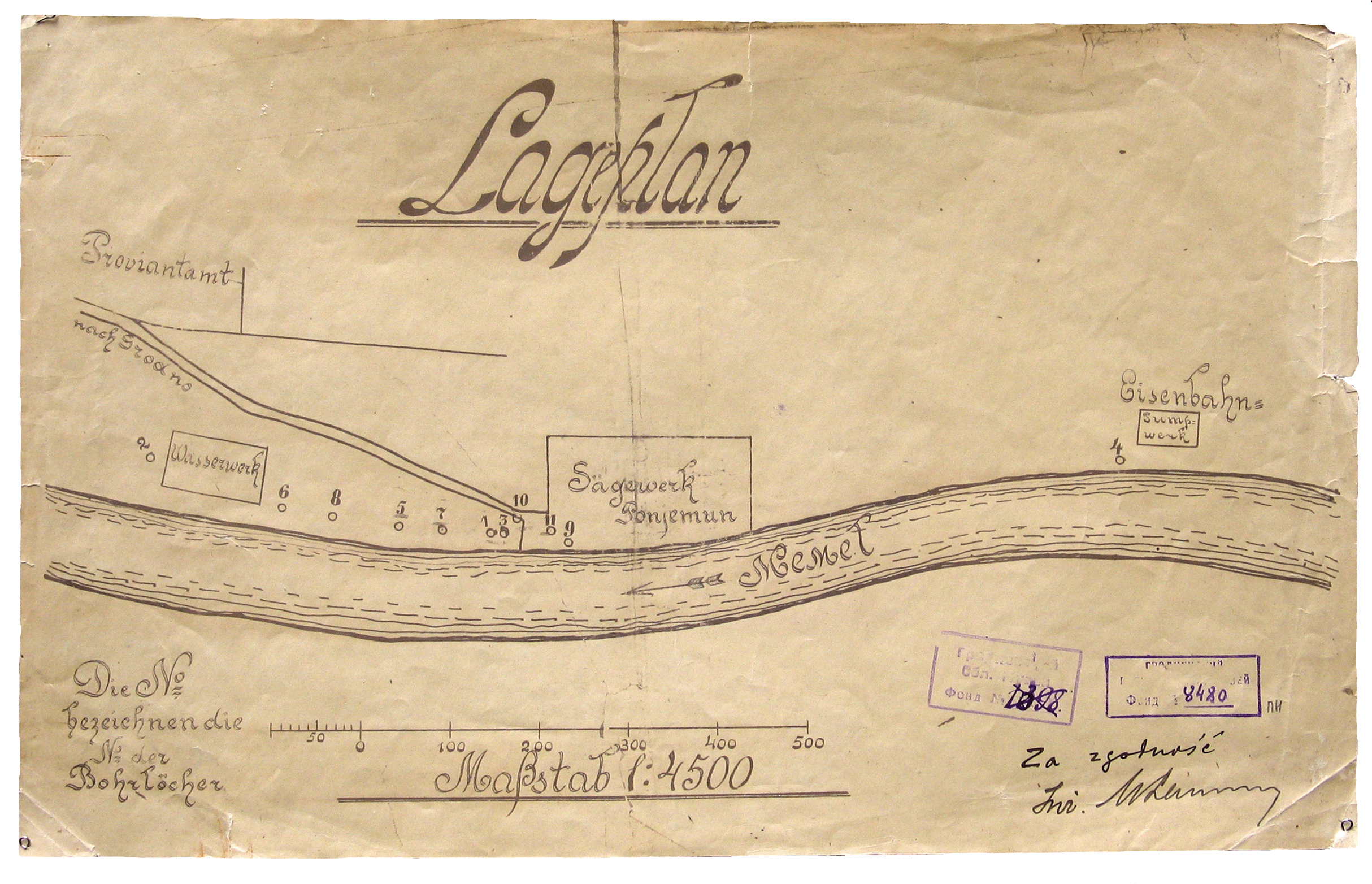 Беларуская (тарашкевіца): Горадня (Horadnia), Панямунь (Paniamuń). Плян